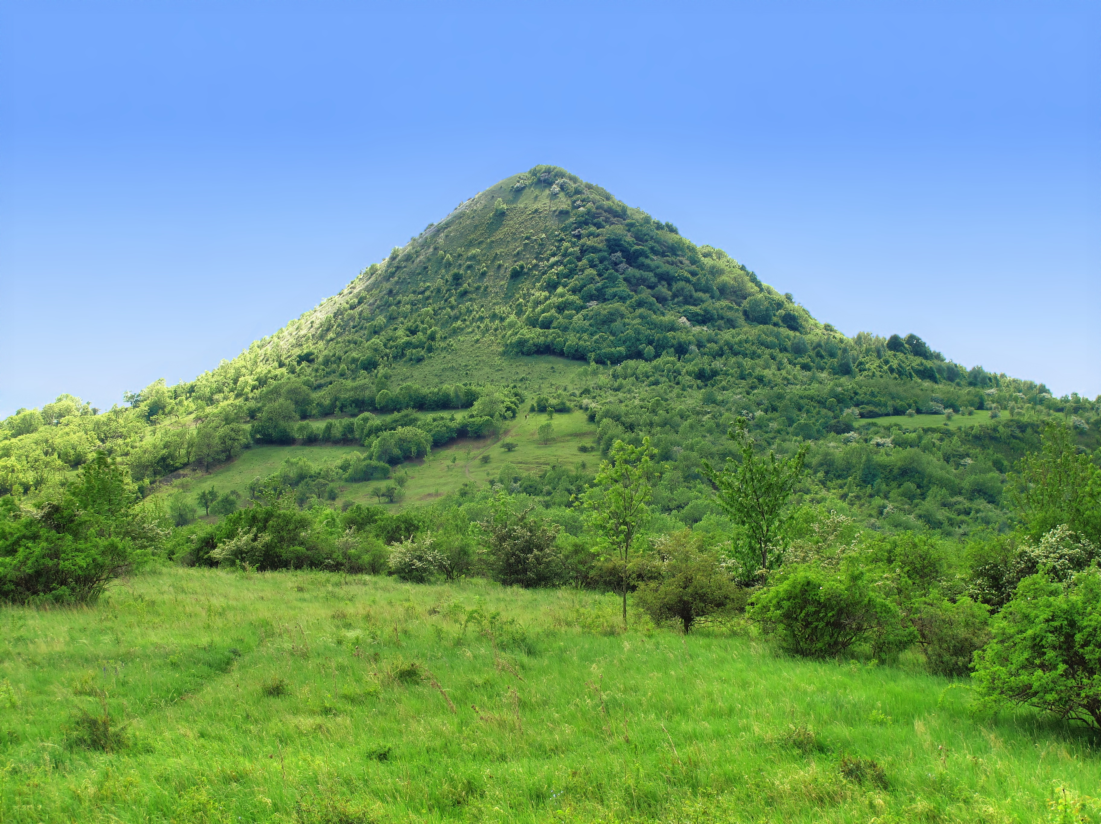 Oblík (509 m) v Českém středohoří od Srdova.